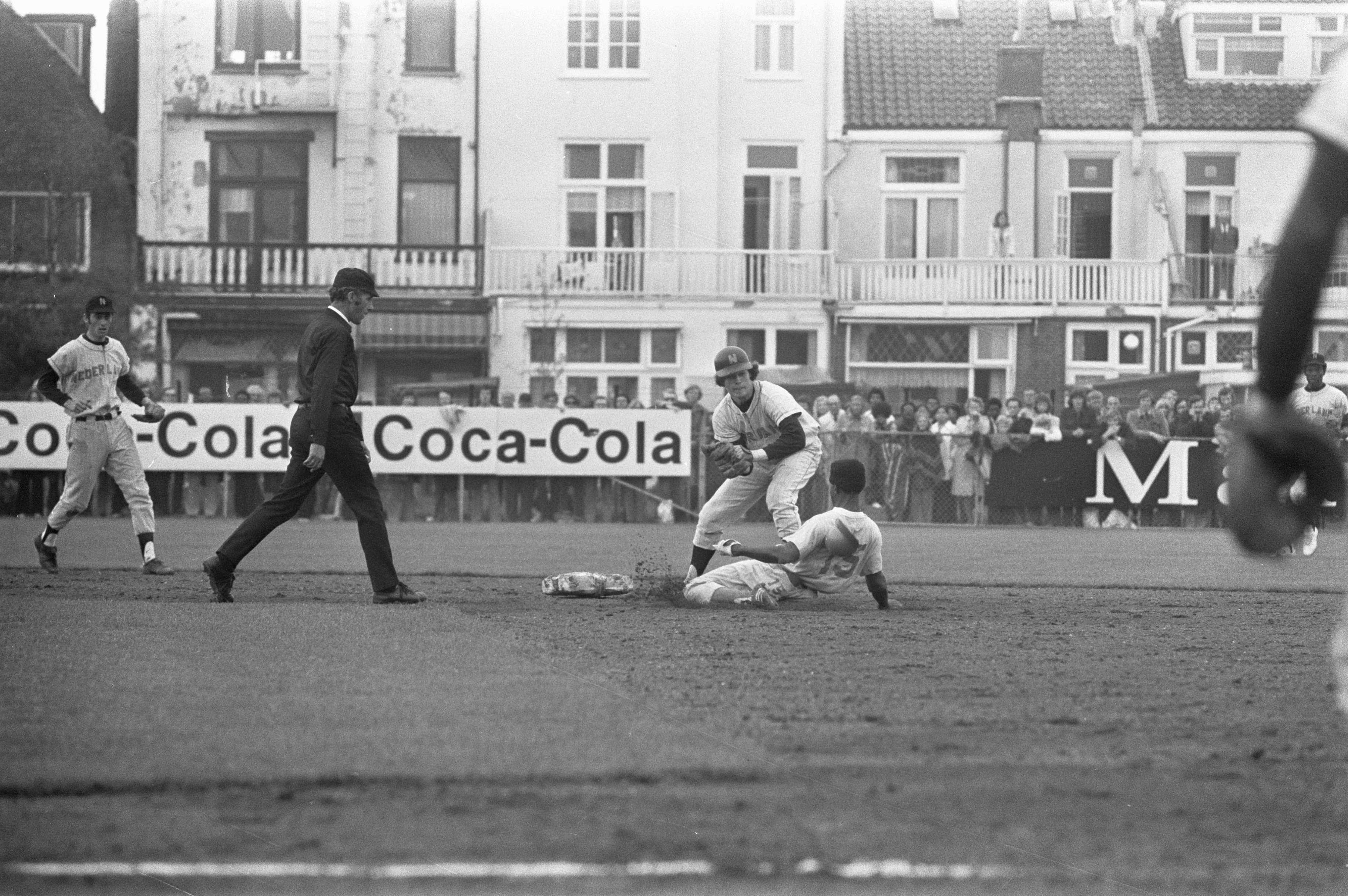 Collectie / Archief : Fotocollectie Anefo Reportage / Serie : [ onbekend ] Beschrijving : Haarlemse Honkbalweek, Nederland tegen Nederlandse Antill 4-2, Urbanus (jr) vangt Gumbs uit Datum : 9 juli 1972 Locatie : Haarlem Trefwoorden : honkbal Persoonsnaam : Urbanus Fotograaf : Peters, Hans / Anefo Auteursrechthebbende : Nationaal Archief Materiaalsoort : Negatief (zwart/wit) Nummer archiefinventaris : bekijk toegang 2.24.01.05 Bestanddeelnummer : 925-7280